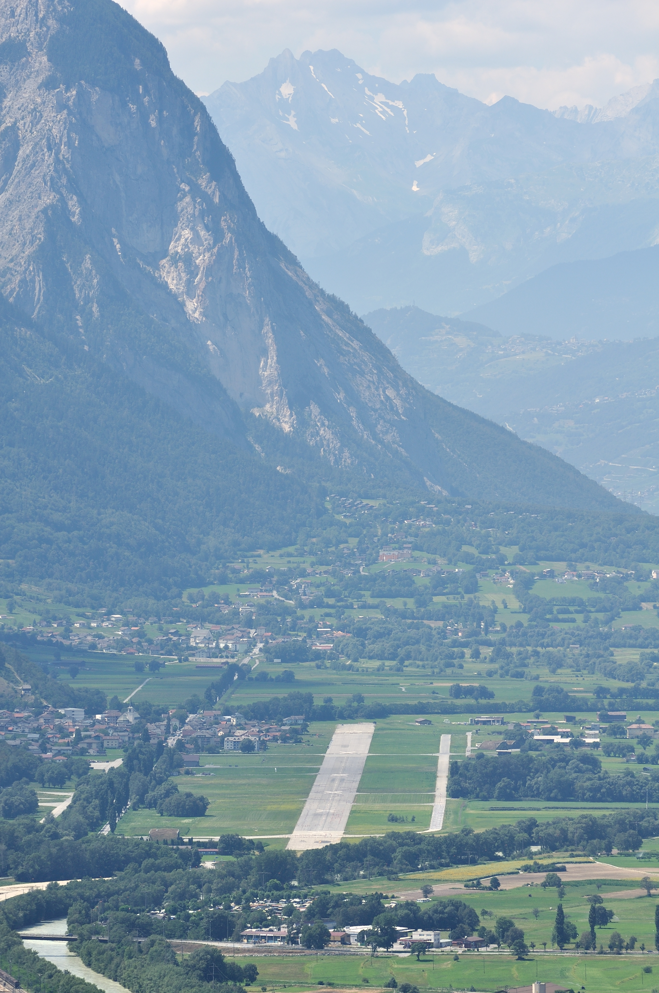 Switzerland, Valais, hike on Lötschberg Südrampe